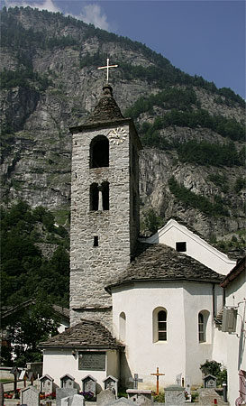 Kirche in Gondo